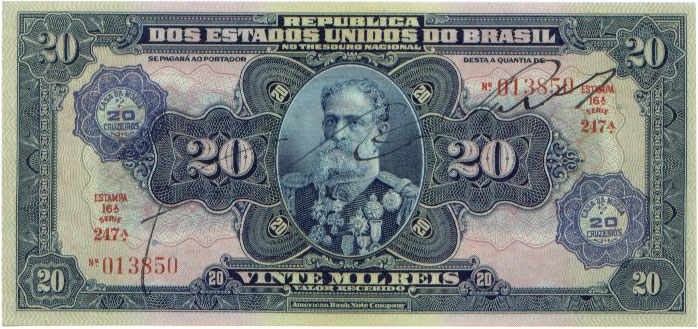 O primeiro presidente do Brasil, Deodoro da Fonseca numa nota de 20 mil réis de 1925. A nota contém dois carimbos retificando o valor de face para 20 cruzeiros após correção monetária em 1942.